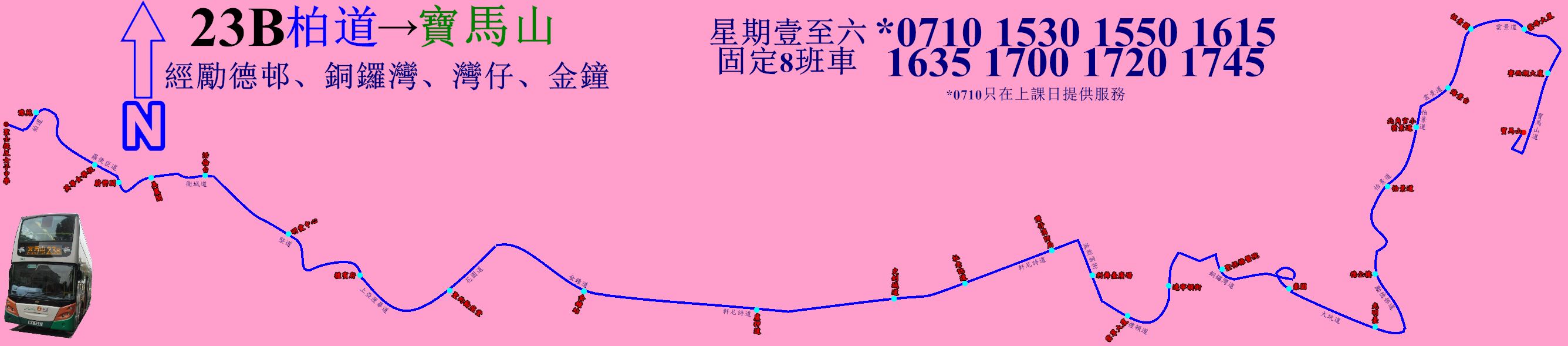 中文（香港）: 新巴23B線(往寶馬山方向)的走線圖